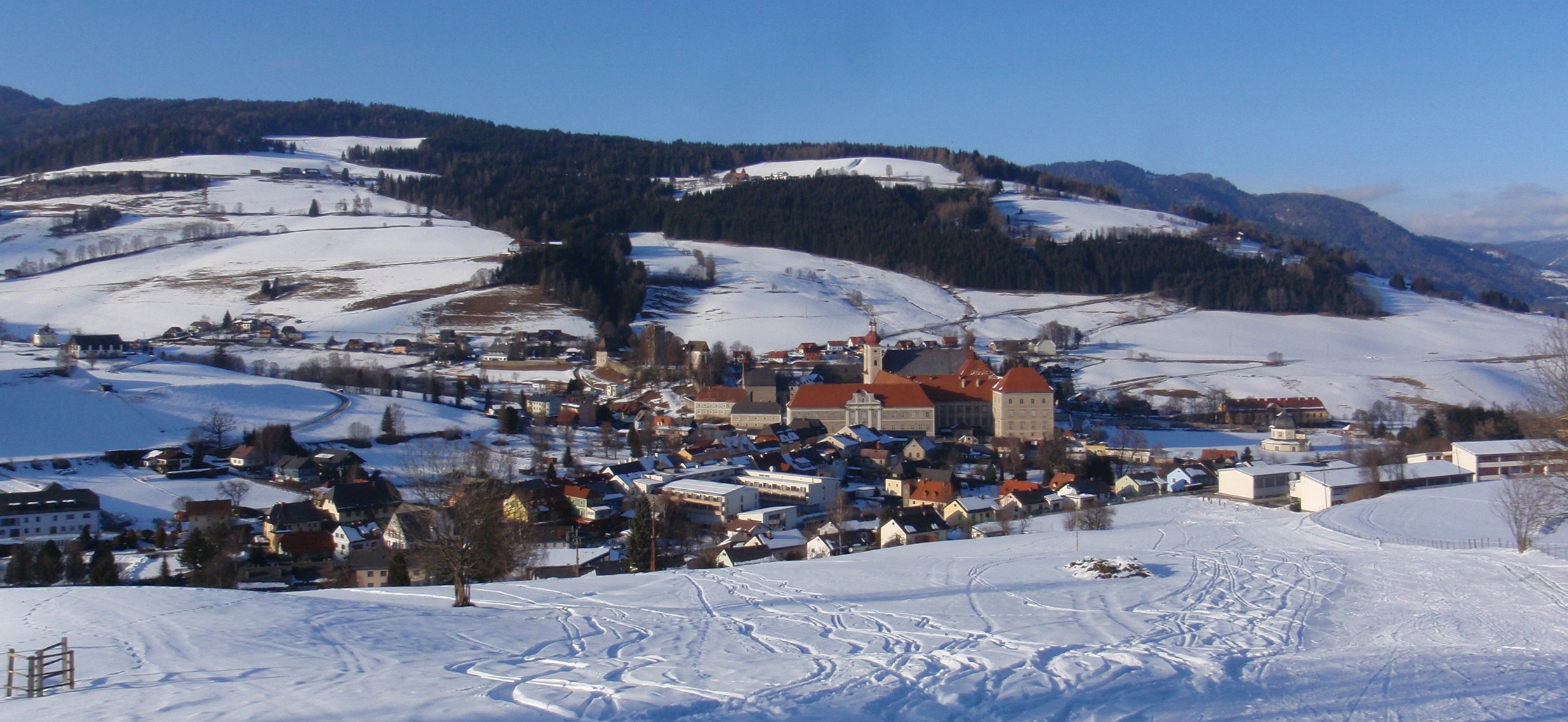 St. Lambrecht mit Benediktinerstift im Winter